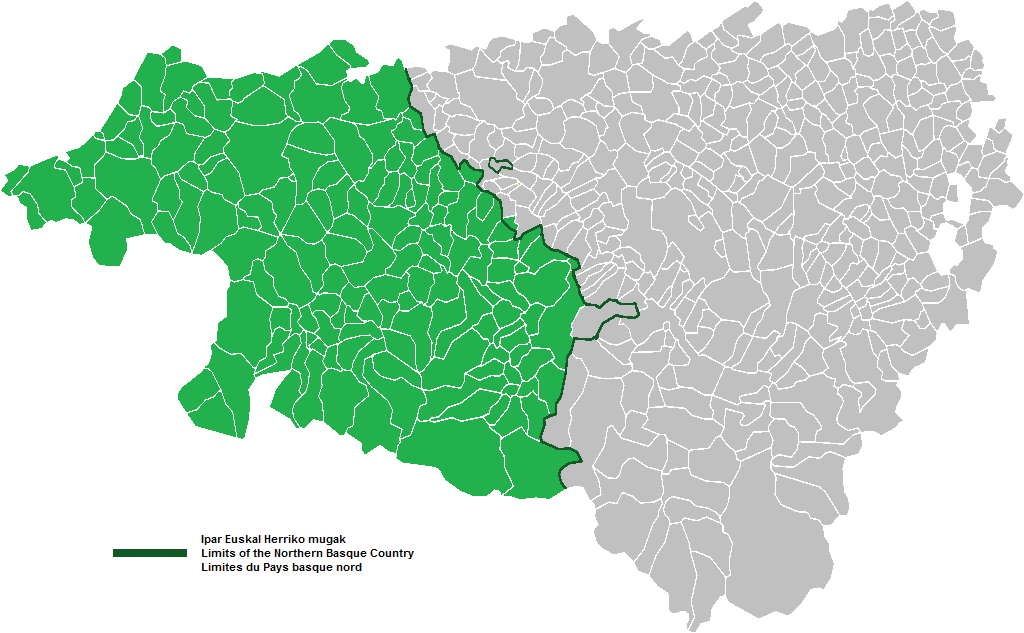 Ipar Euskal Herriko Hirigune Elkargoko muga.